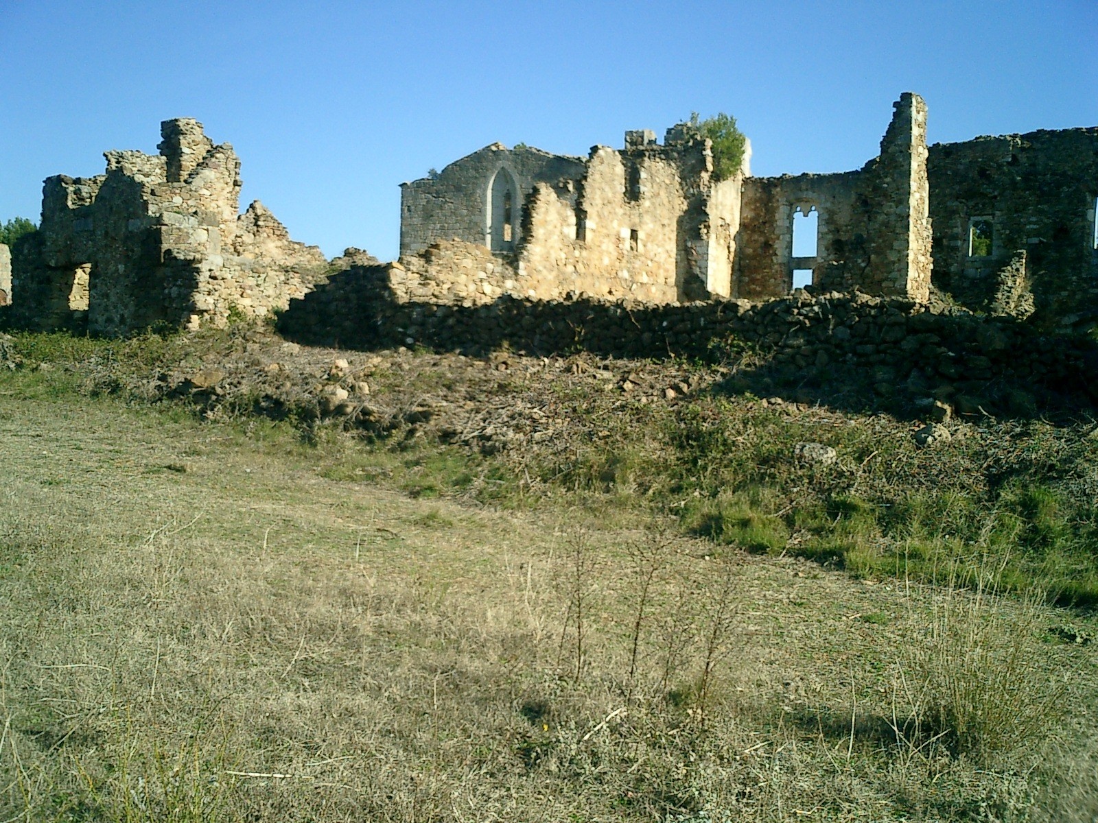 Vista de les ruines de Santa Maria del Roure